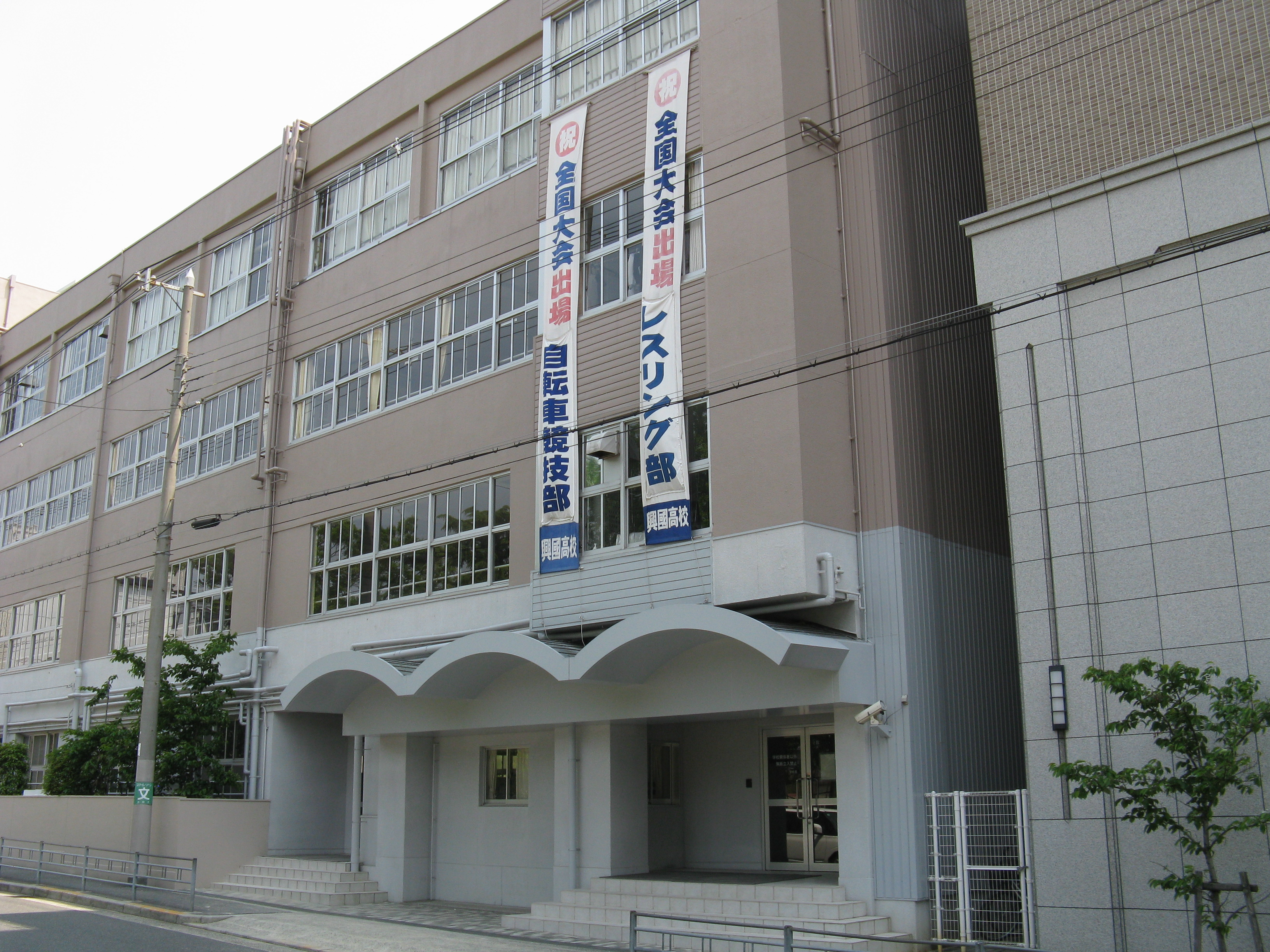 興國高等学校